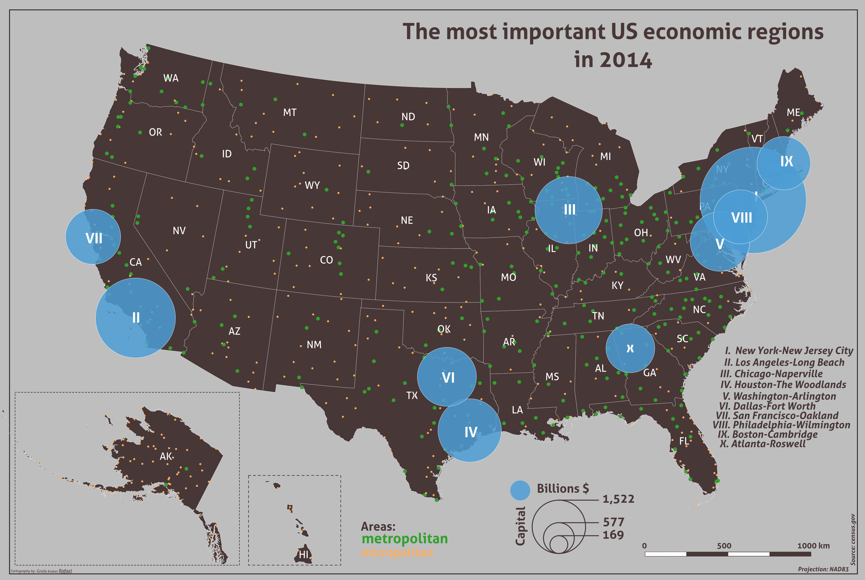 USA Economics region in 2014